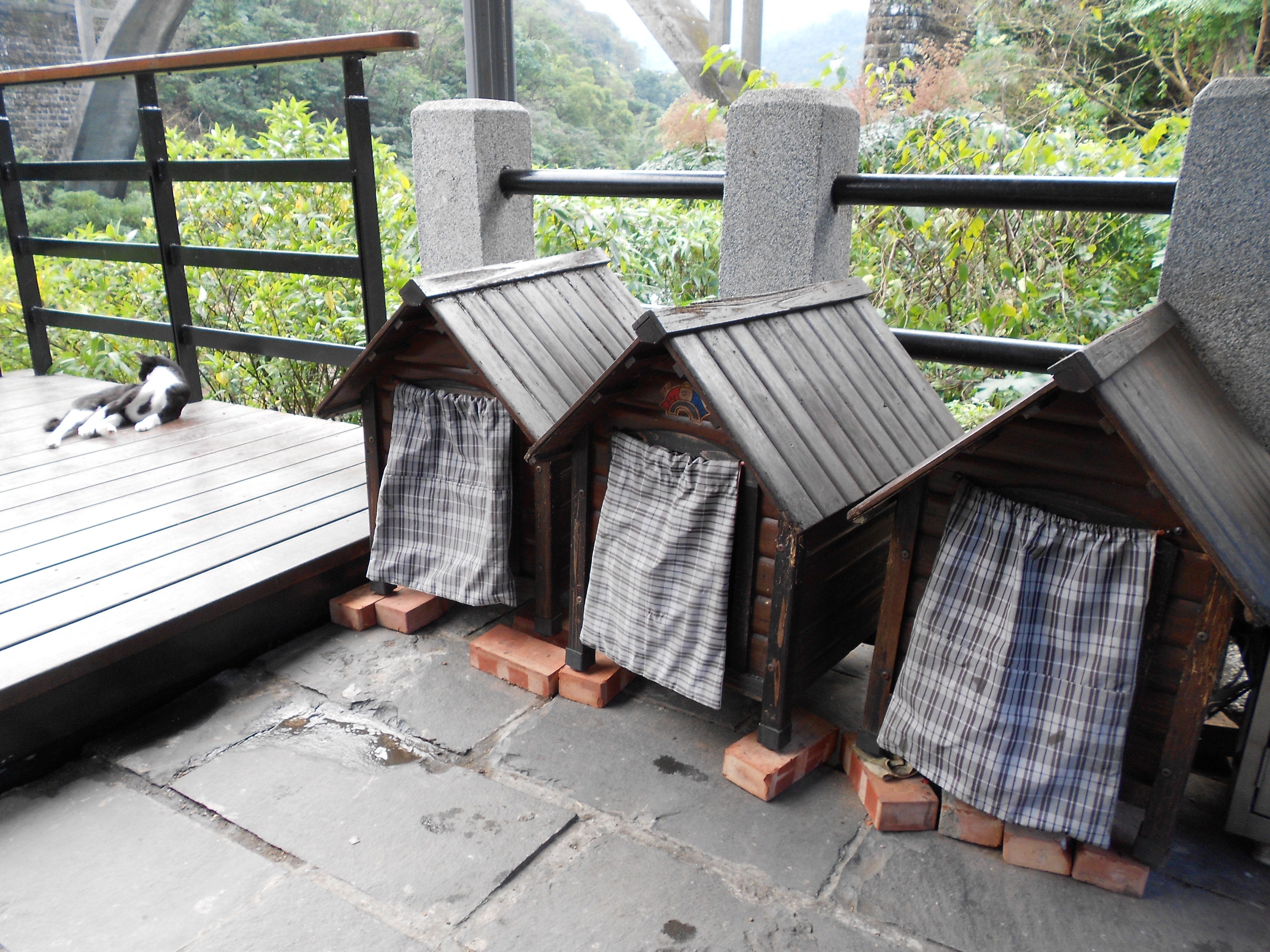 瑞芳區 侯硐貓村 貓屋